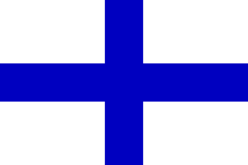 Флаг Лиманской (Черноморской) флотилии Войска верных казаков (1787).